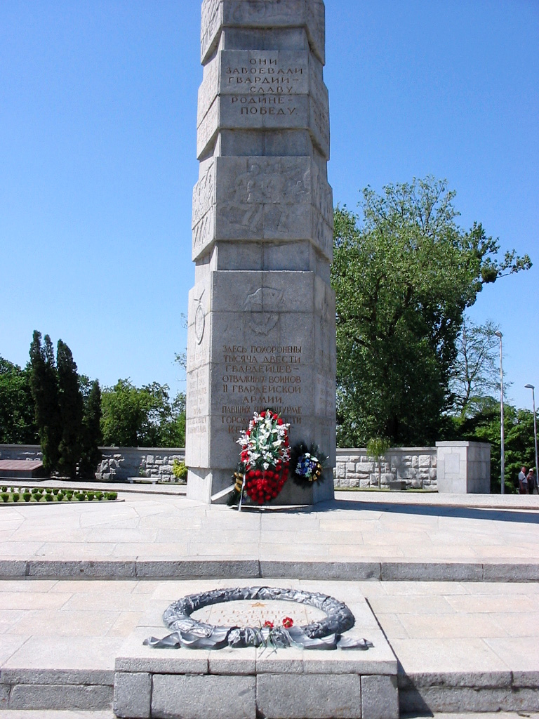 Pamyatnik 1200 gvardeitsam